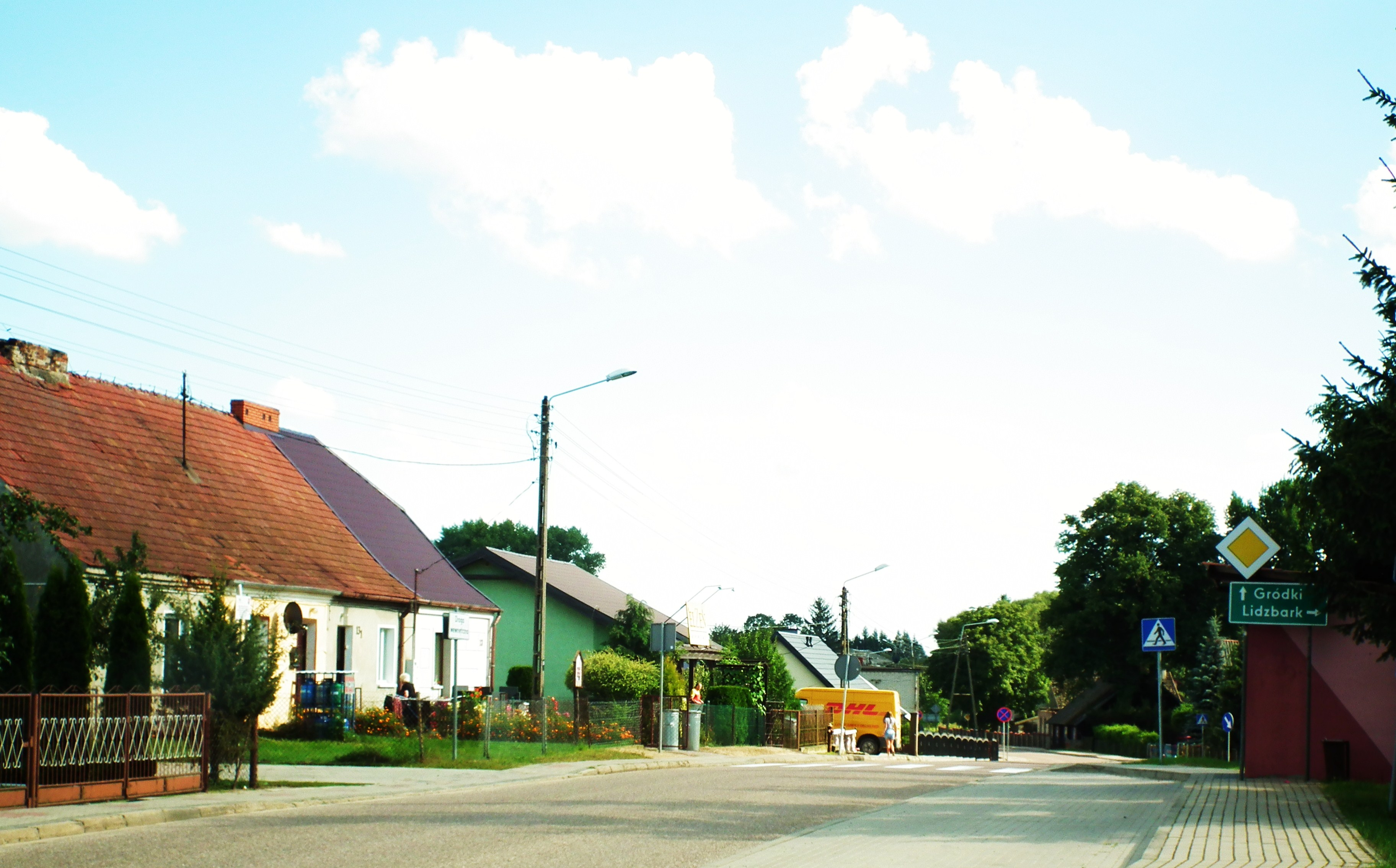 Centrum - Koszelewy.